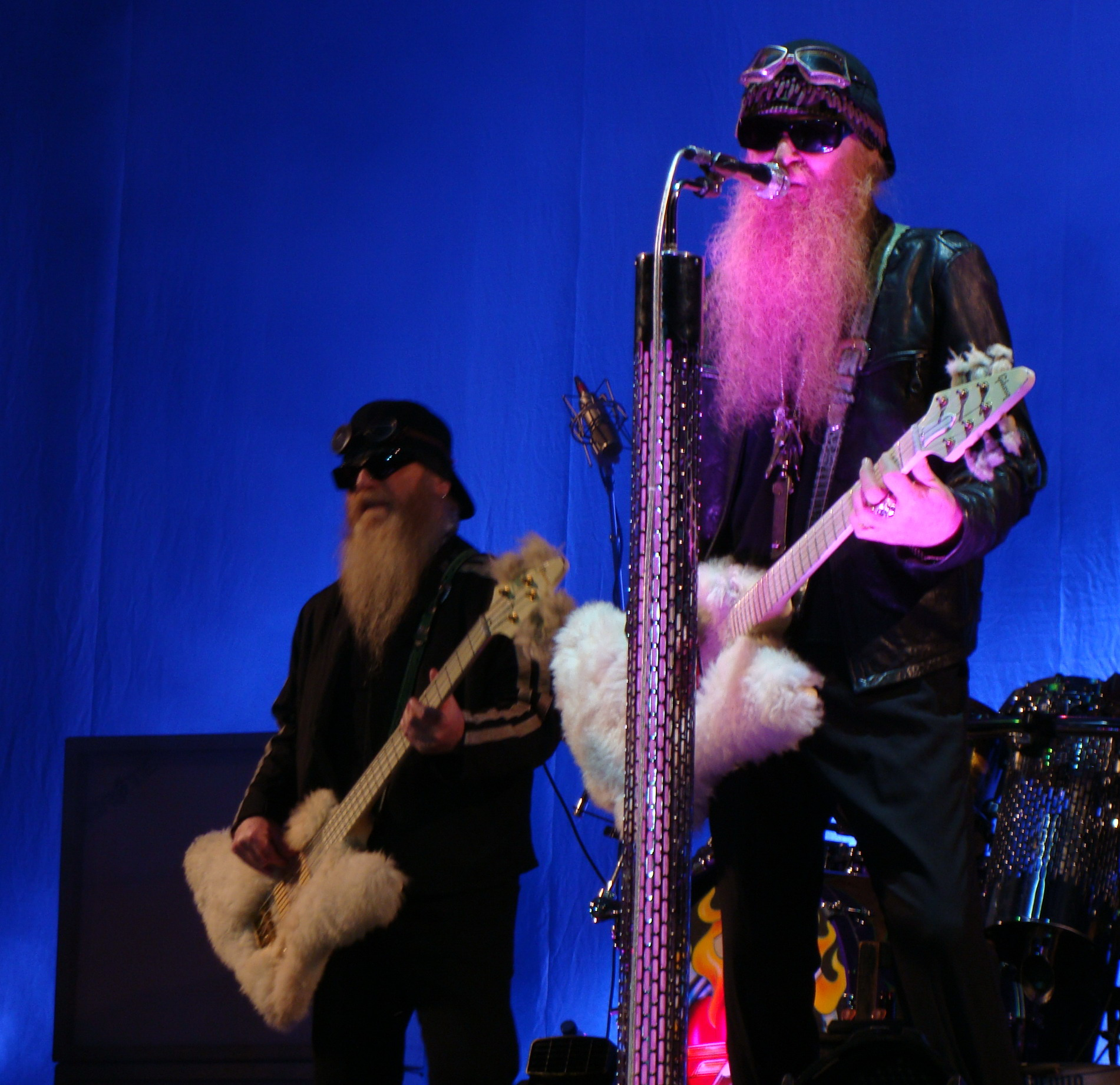 Dusty Hill y Billy Gibbons en un concierto de ZZ Top en el Bilbao BBK Live 2008.